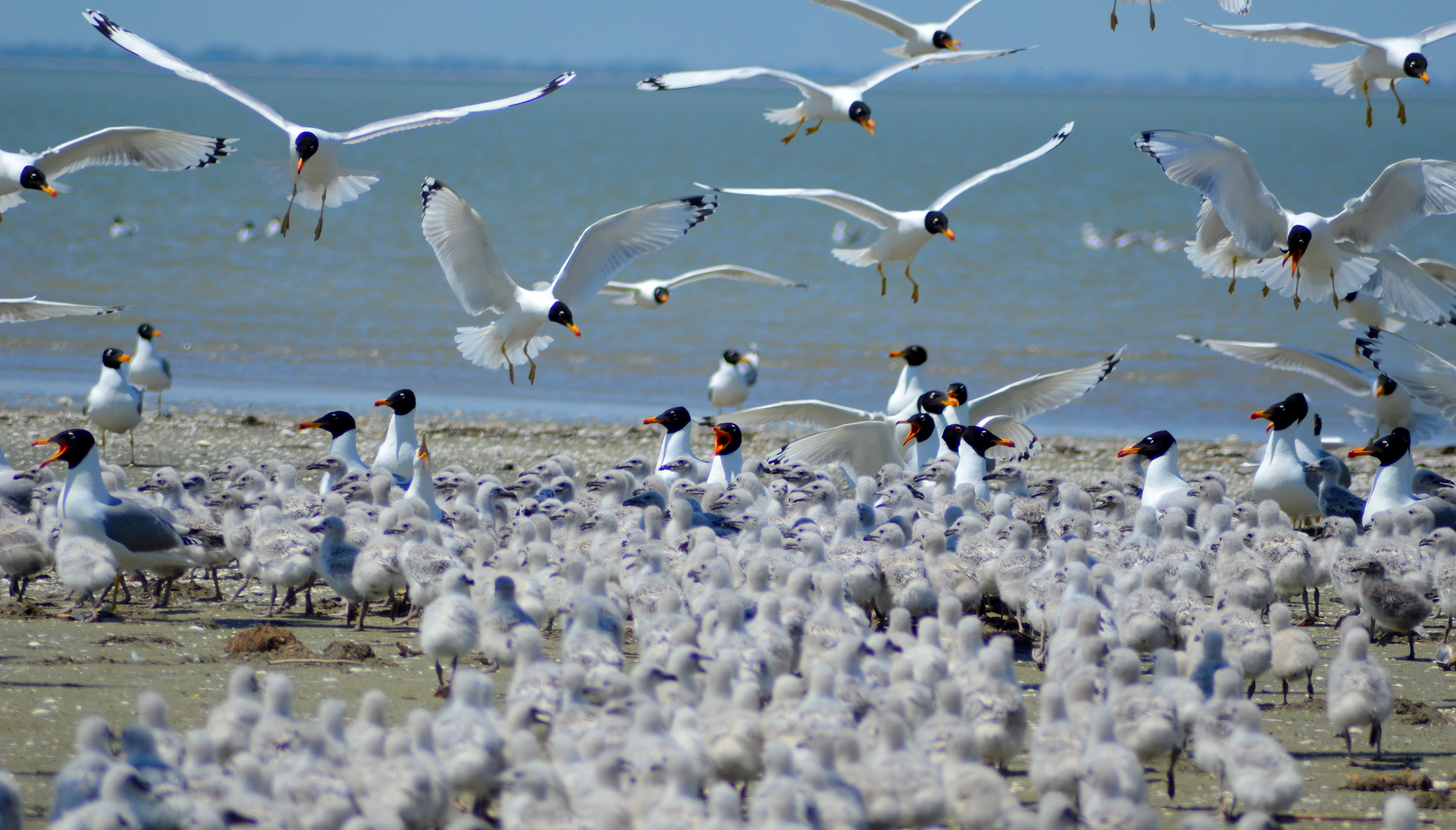 Дунайський біосферний заповідник, Кілійський р-н, м. Вилкове, вул. Татарбунарського повстання, 132 а